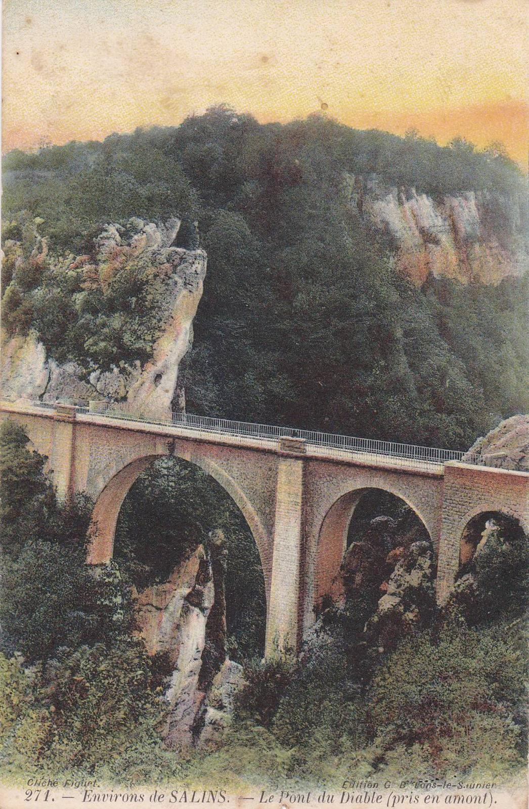 crouzet-migette image aérienne du pont du diable